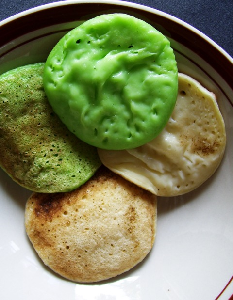 Surabi pandan and Surabi plain